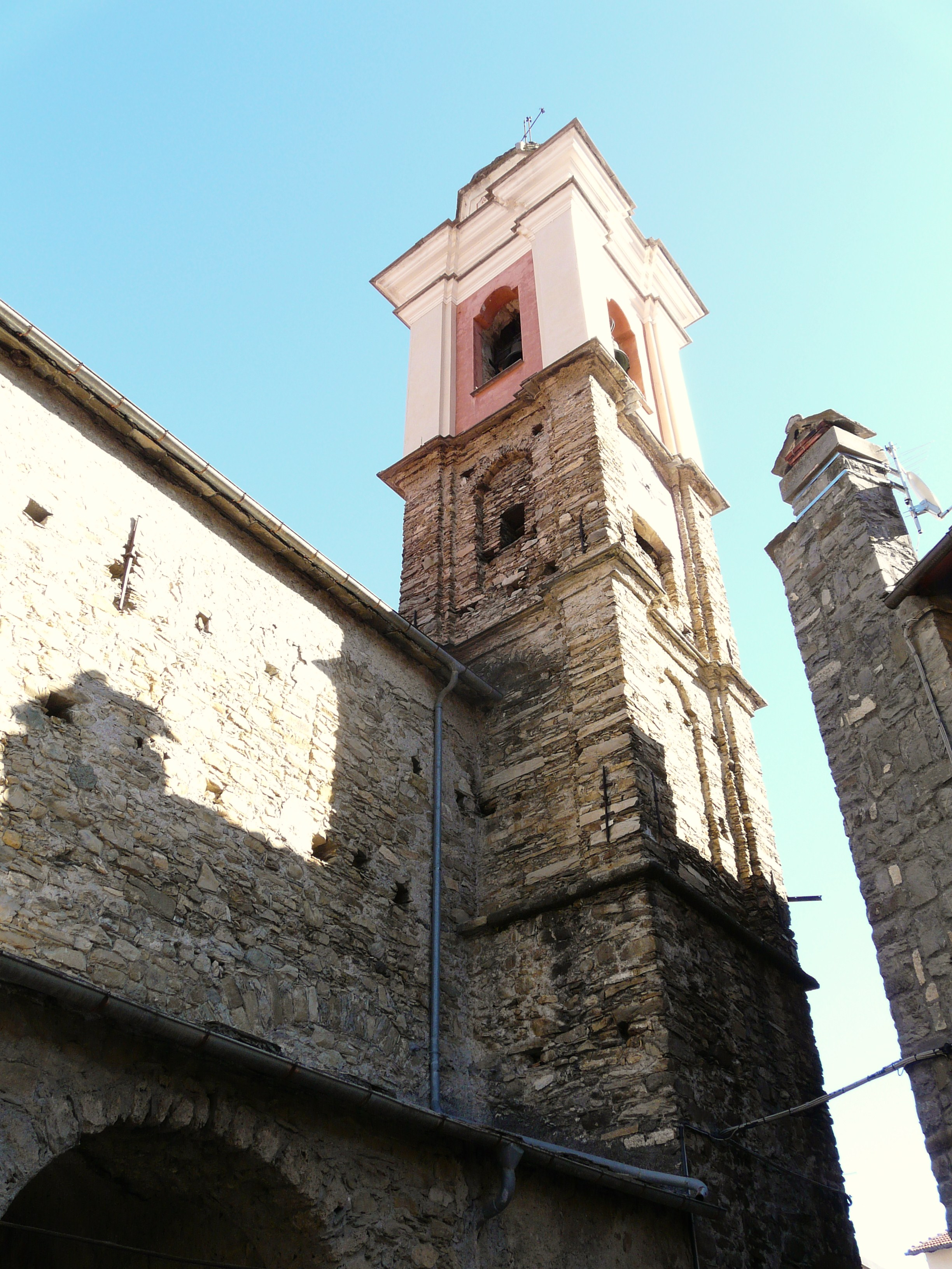 Chiesa di San Biagio, Montegrosso Pian Latte, Liguria, Italia